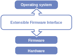 Позицията на EFI в софтуерния стек